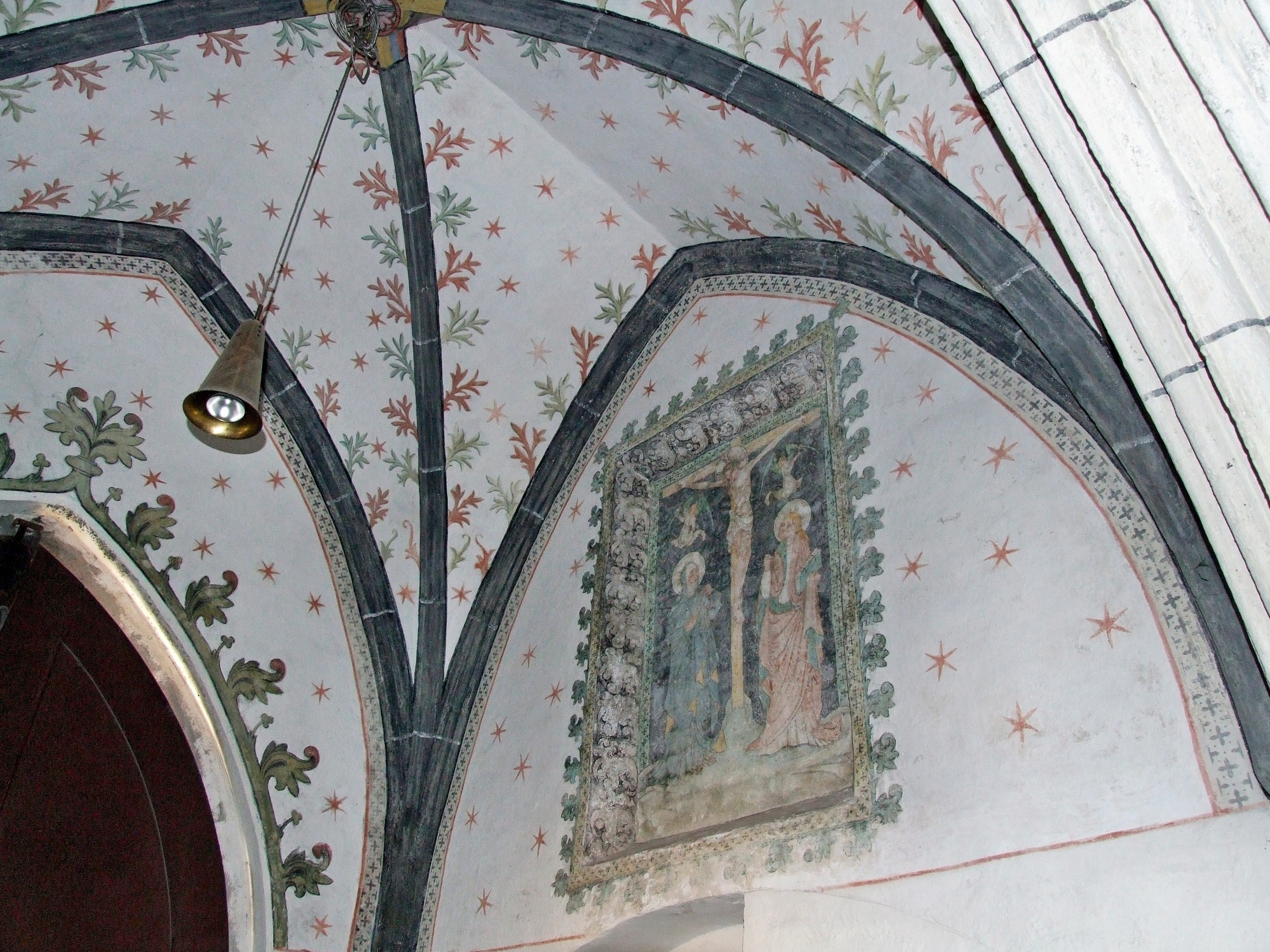 Unser Frauen in Memmingen